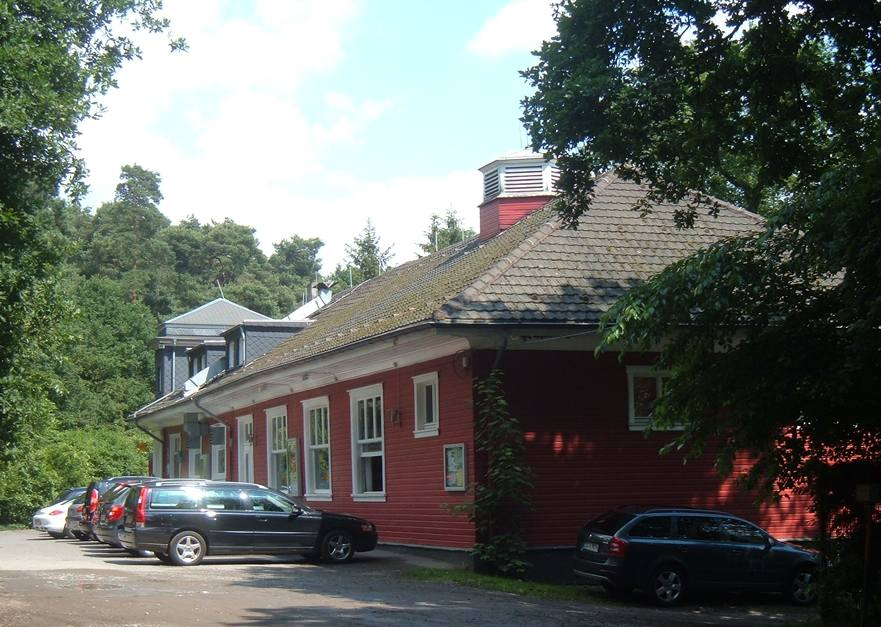 Ehemaliges Bahnhofsgebäude Porz-Königsforst